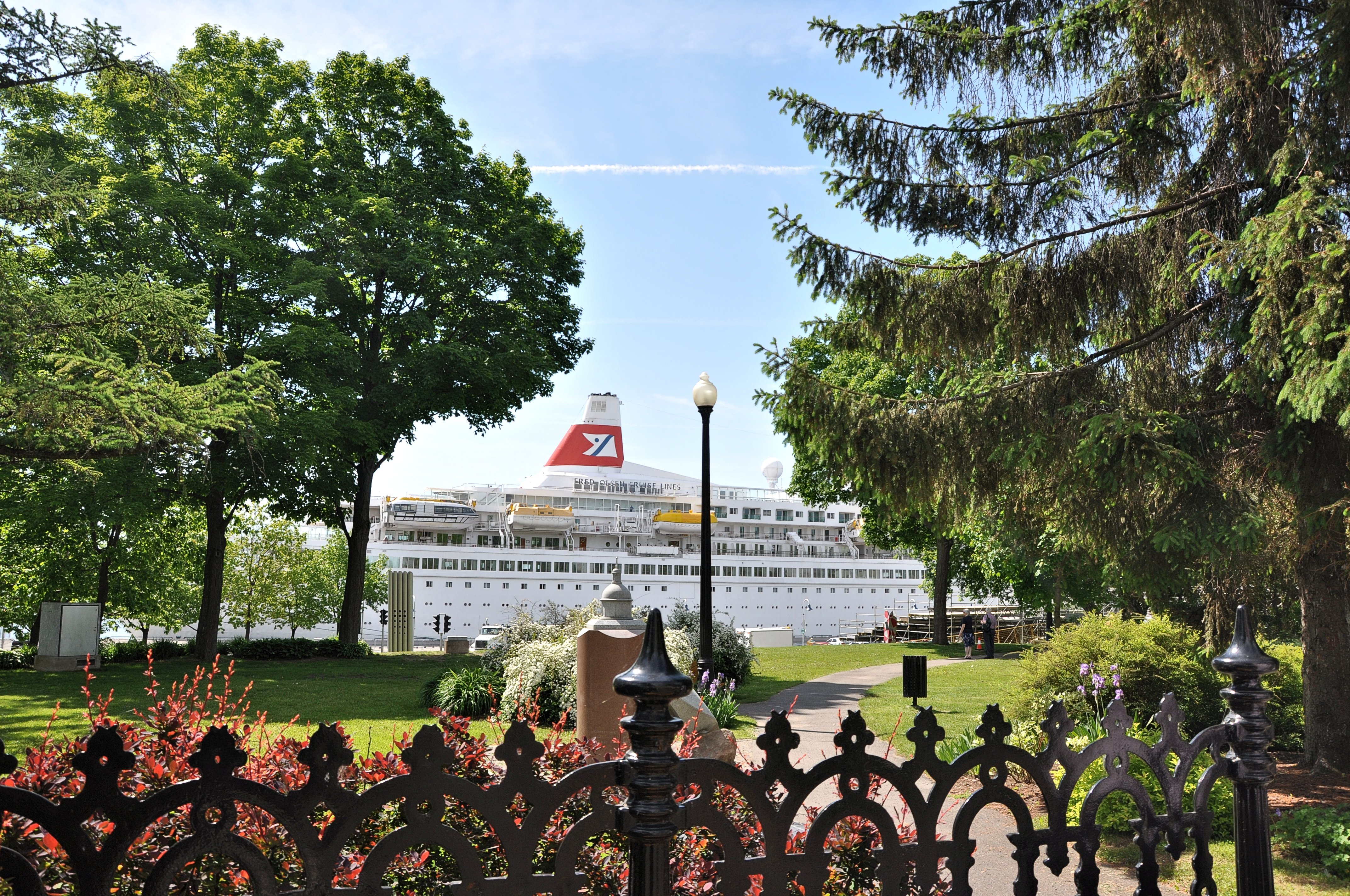 View of the Parc du Jardin des Ursulines.